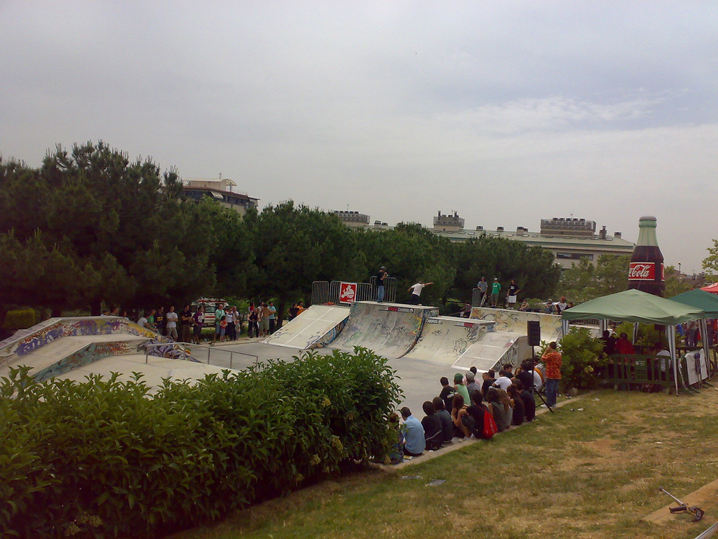 Competi Sabadell Maig-2009